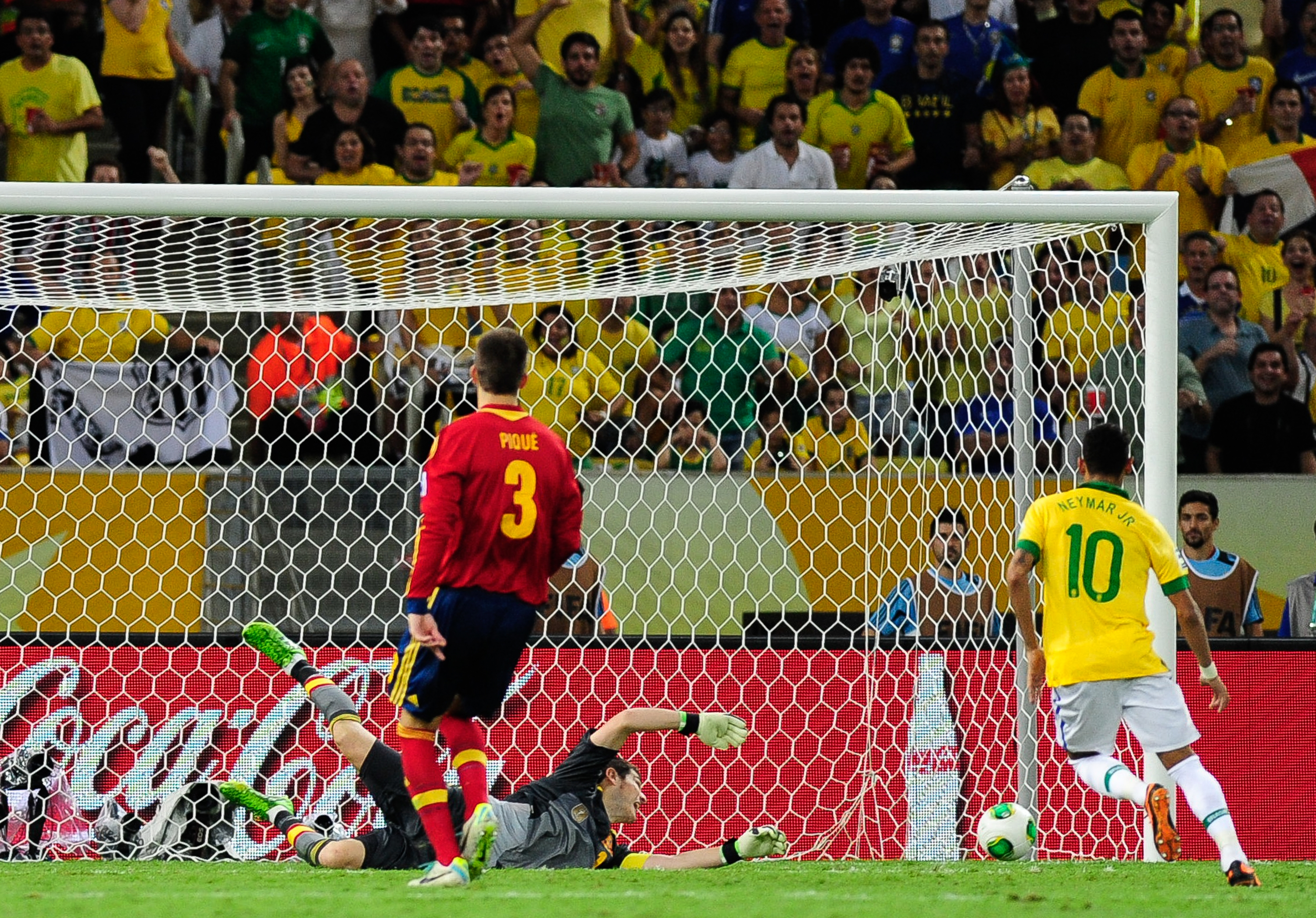 No Estádio do Maracanã, Brasil e Espanha disputam a taça da Copa das Confederações de 2013.